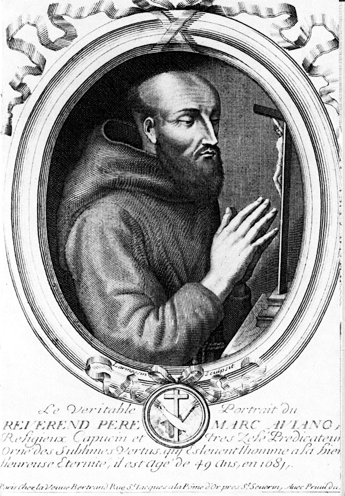 Beato Marco d'Aviano, Aviano (Italia) 1631- Viena (Austria) 1699.